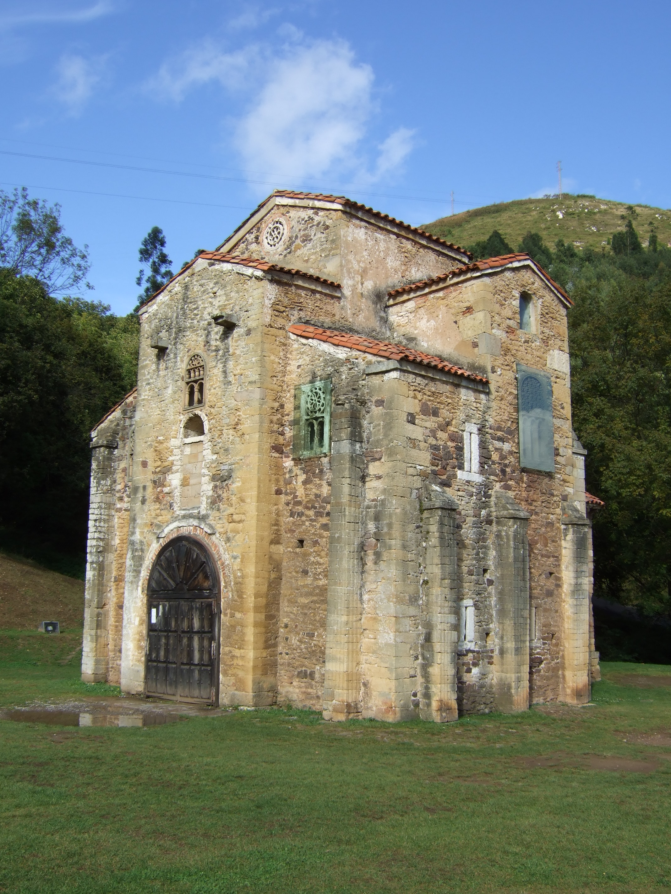 Oviedo - San Miguel de Lillo